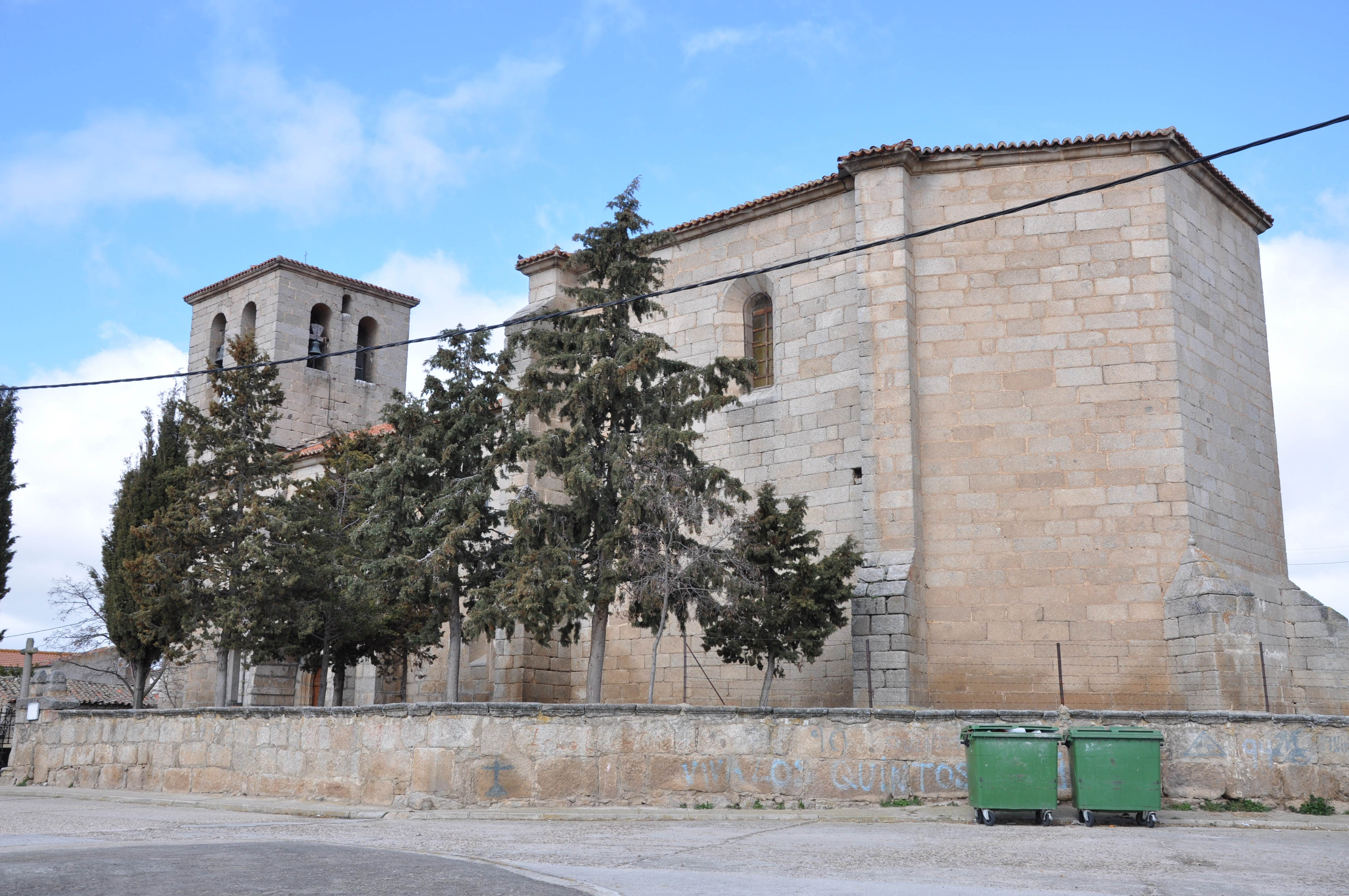 Iglesia parroquial de Cabezas del Villar, AV, España